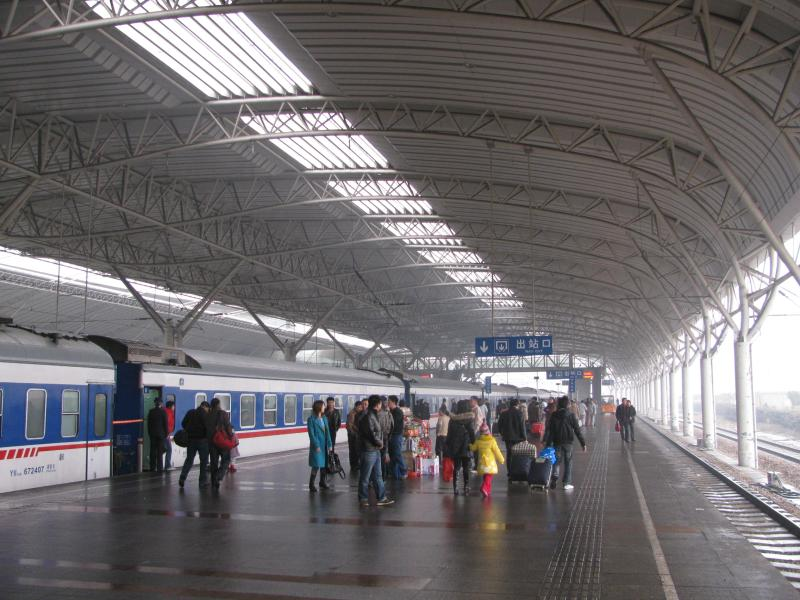 200901 张掖